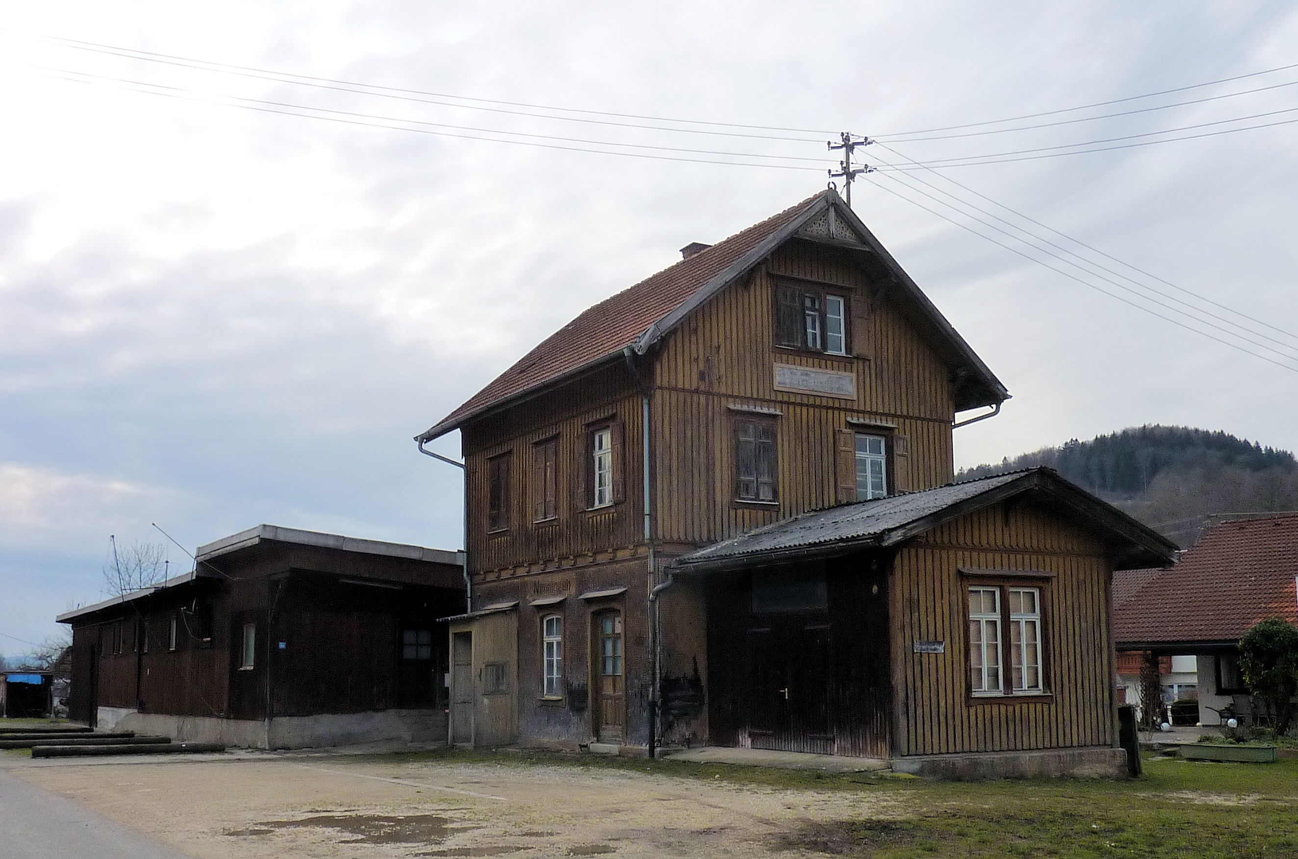 Bahnhof Nenningen